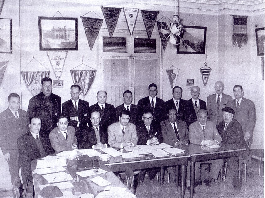 Membres de la première réunion de la Fédération algérienne de football.Sont présent sur la photo: de gauche à droite. Assis au premier rang, messieurs Boutebila, Lekehal, Djaout, le Président Maouche, Kassoul, Benamar, Lefgoun et Belkahla. Deuxième rang, messieurs Bendib, Ouhibi, Zaïbek, Takarli, Hassen Khodja, Benoura, Bensiam, Cosman, Bir et Wendel.